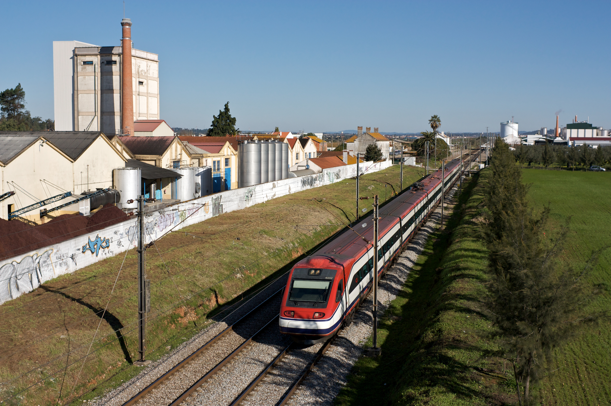 Tipo: Comboio Alfa Pendular 122 [Porto • Campanhã - Lisboa • Santa Apolónia] Local: Riachos [Linha do Norte, PK 102] Data e hora: 19 de Dezembro de 2009 [11h35] Material: Automotora 4002 [Comboio de Pendulação Activa]